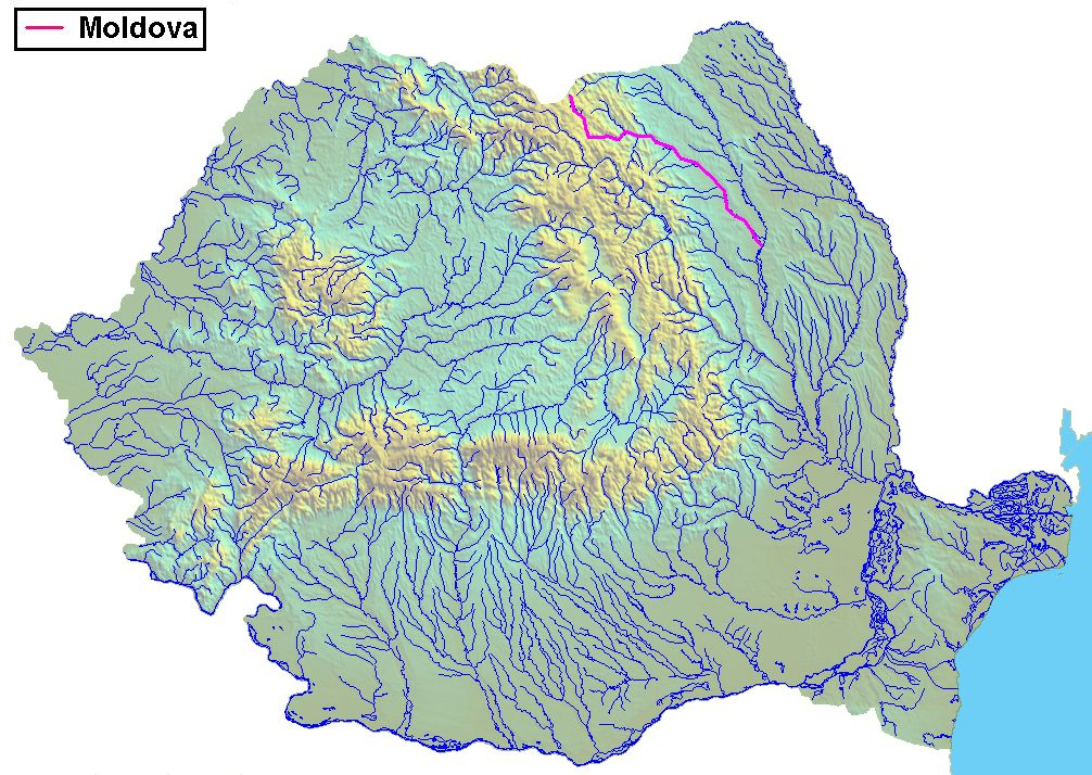 Raul Moldova